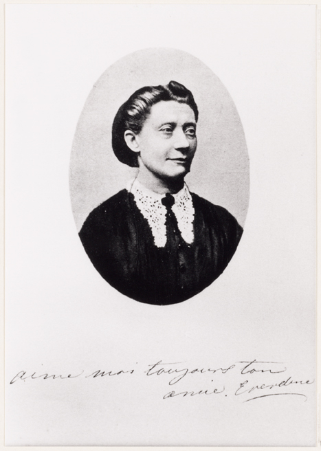 Portret van Tine van Wijnbergen, Dekkers eerste vrouw, met onderschrift